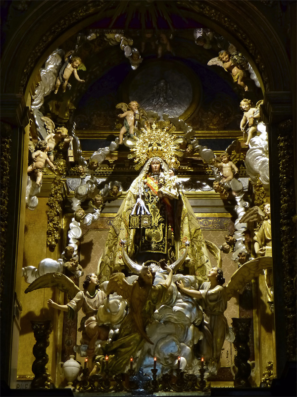 Basílica Nuestra Señora del Carmen Coronada, Jerez de la Frontera, Andalucía, España.